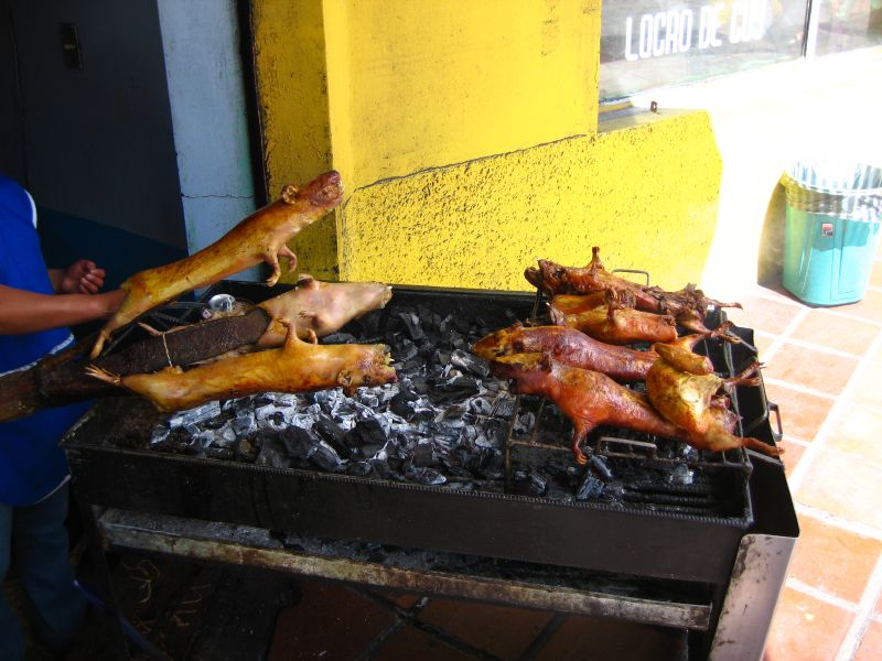 Gebratene Cuys (Meerschweinchen) in Ecuador